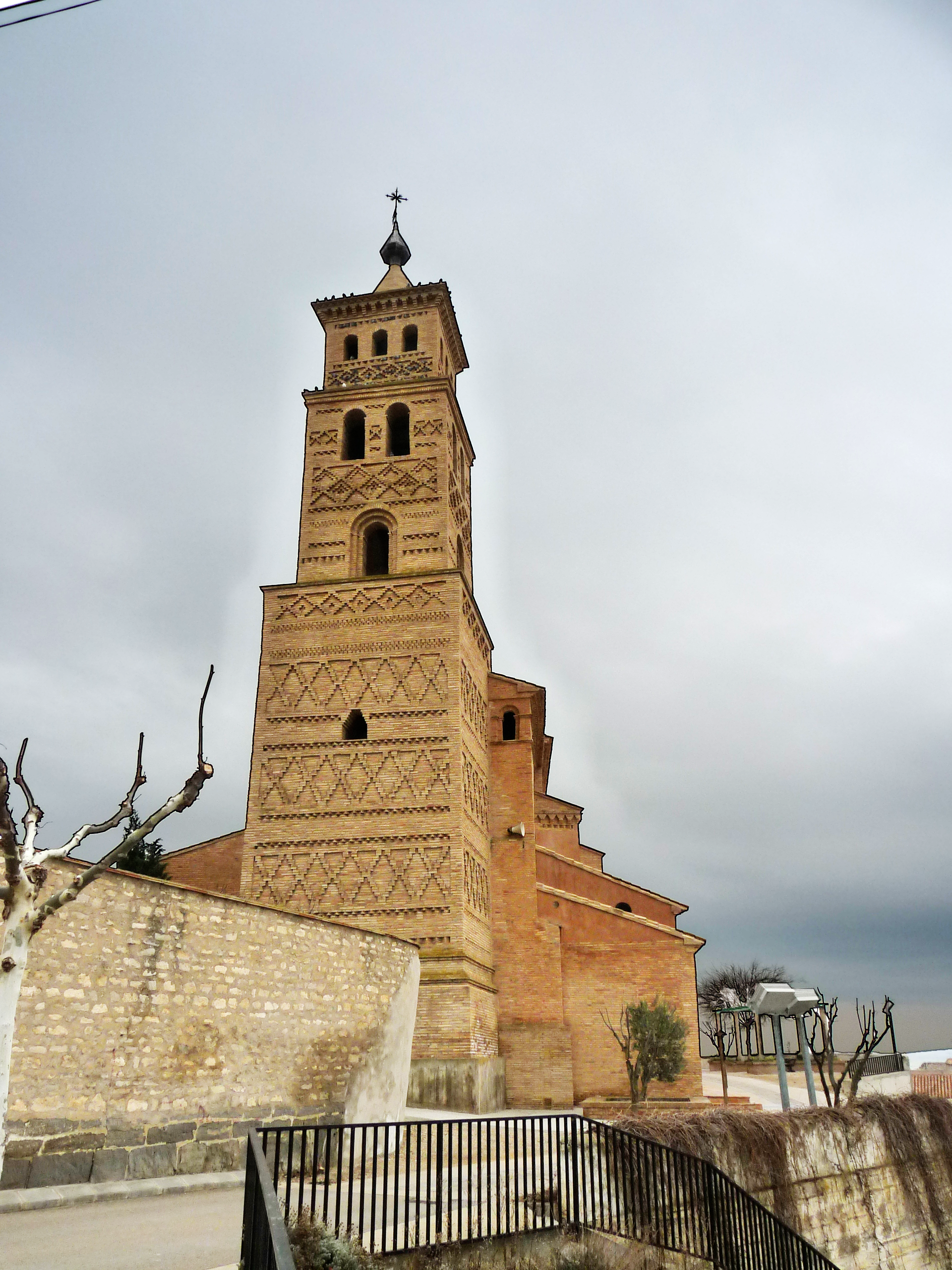 Alcubierre - Iglesia de Santa Ana - Mudéjar aragonés